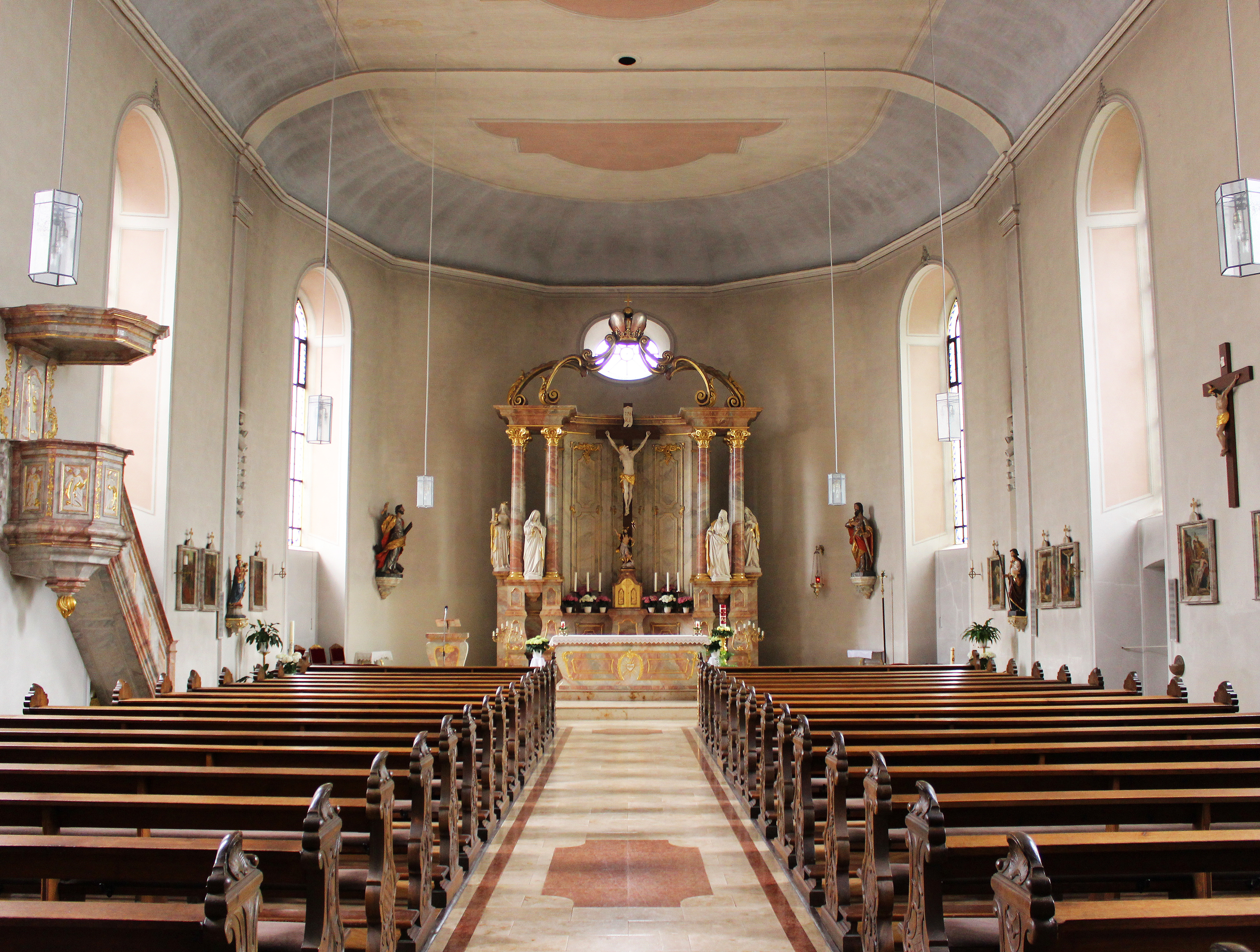 Innenansicht der katholischen Kirche St. Engelbert in St. Ingbert, Saarland